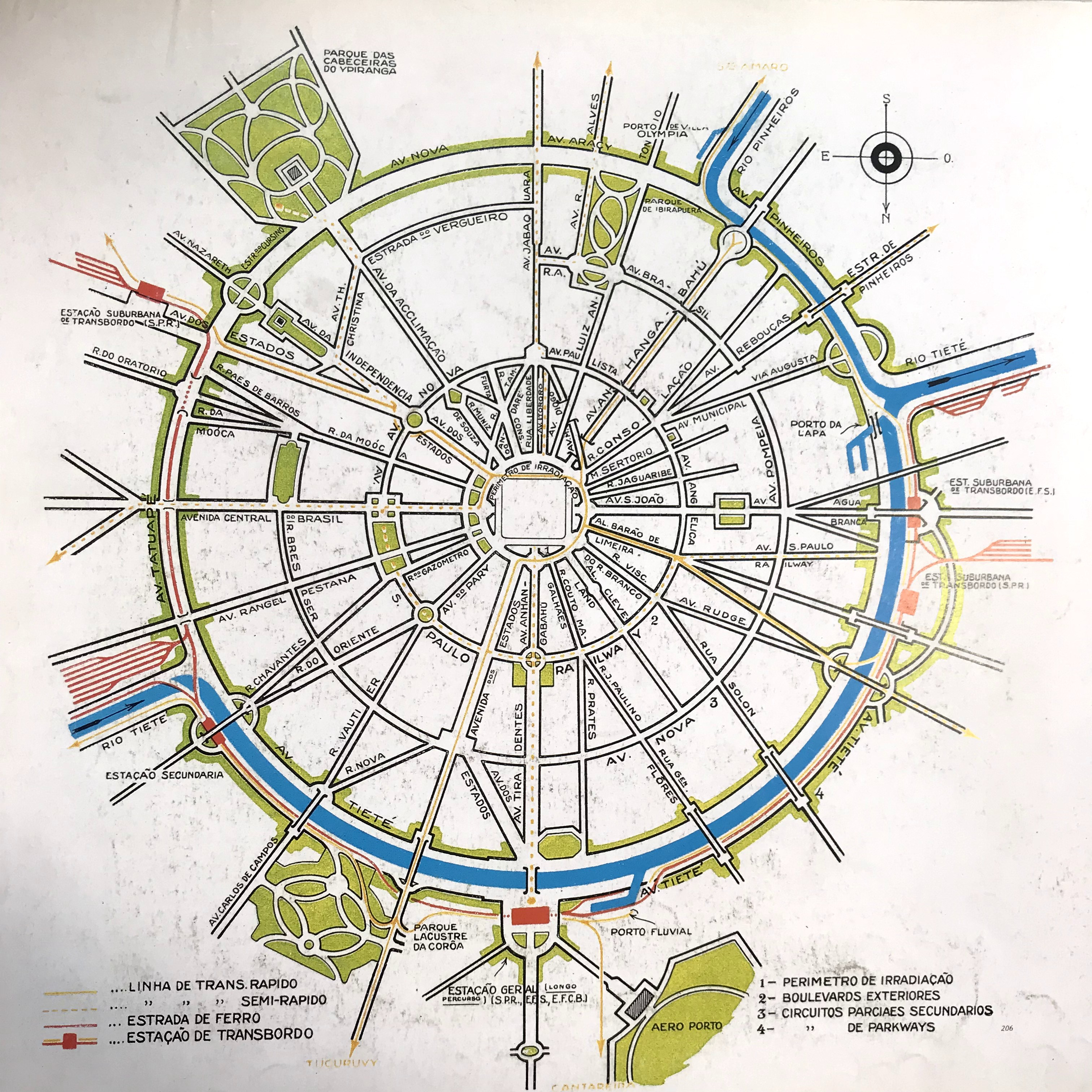 IMAGEM 3